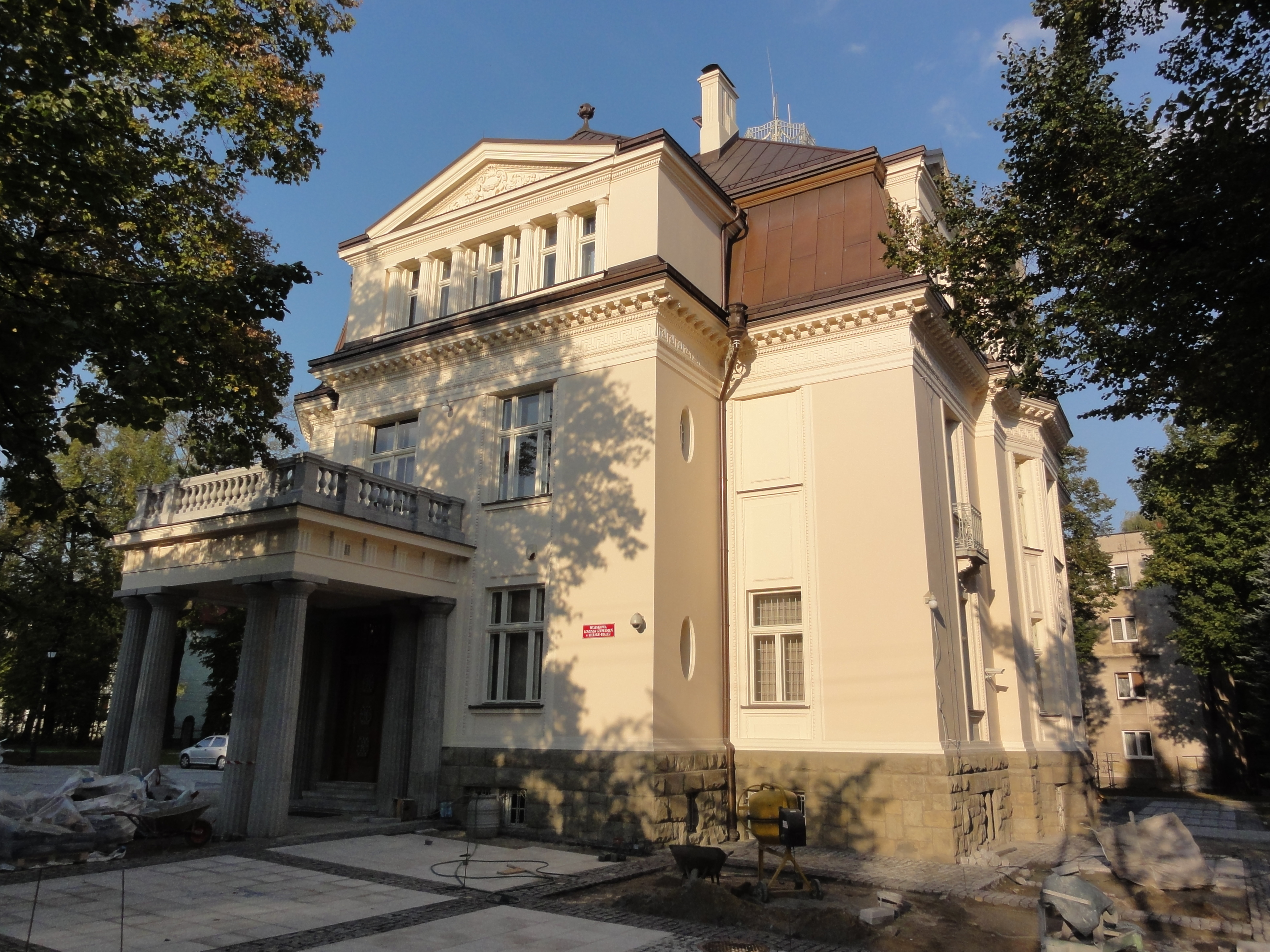 Bielsko-Biała, Piastowska 14, Wojskowa Komenta Uzupełnień